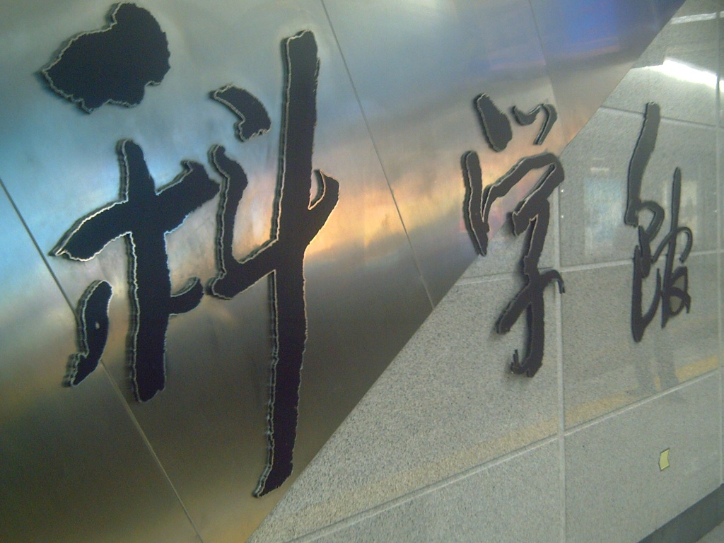 深圳地鐵科學館站的月臺標誌，提醒車上的乘客已到達科學館站。 --Jack Chui 05:42:49 2005年11月20日 (UTC)